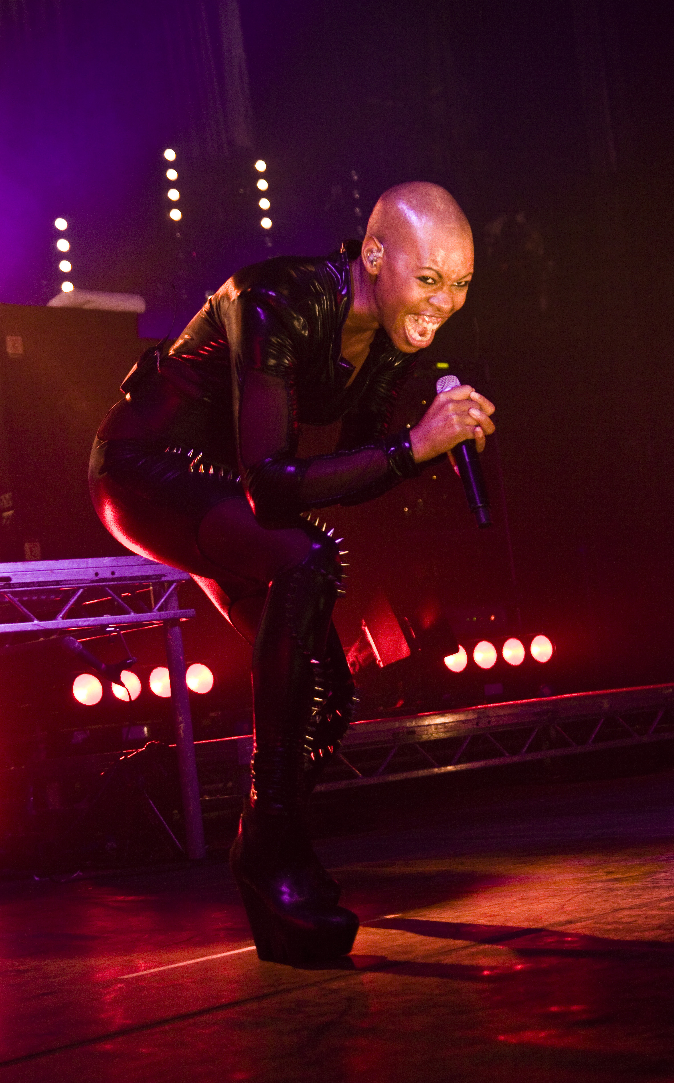 Skunk Anansie - Razzmatazz - Febrero 2011